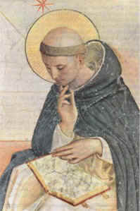 Santo Domingo de Guzman